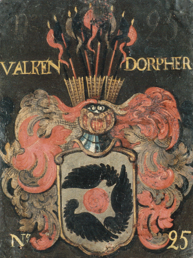 Vapensköld målad på kopparplåt 1664 tillhörande ätten Walkendorff nr 25 på det svenska Riddarhuset